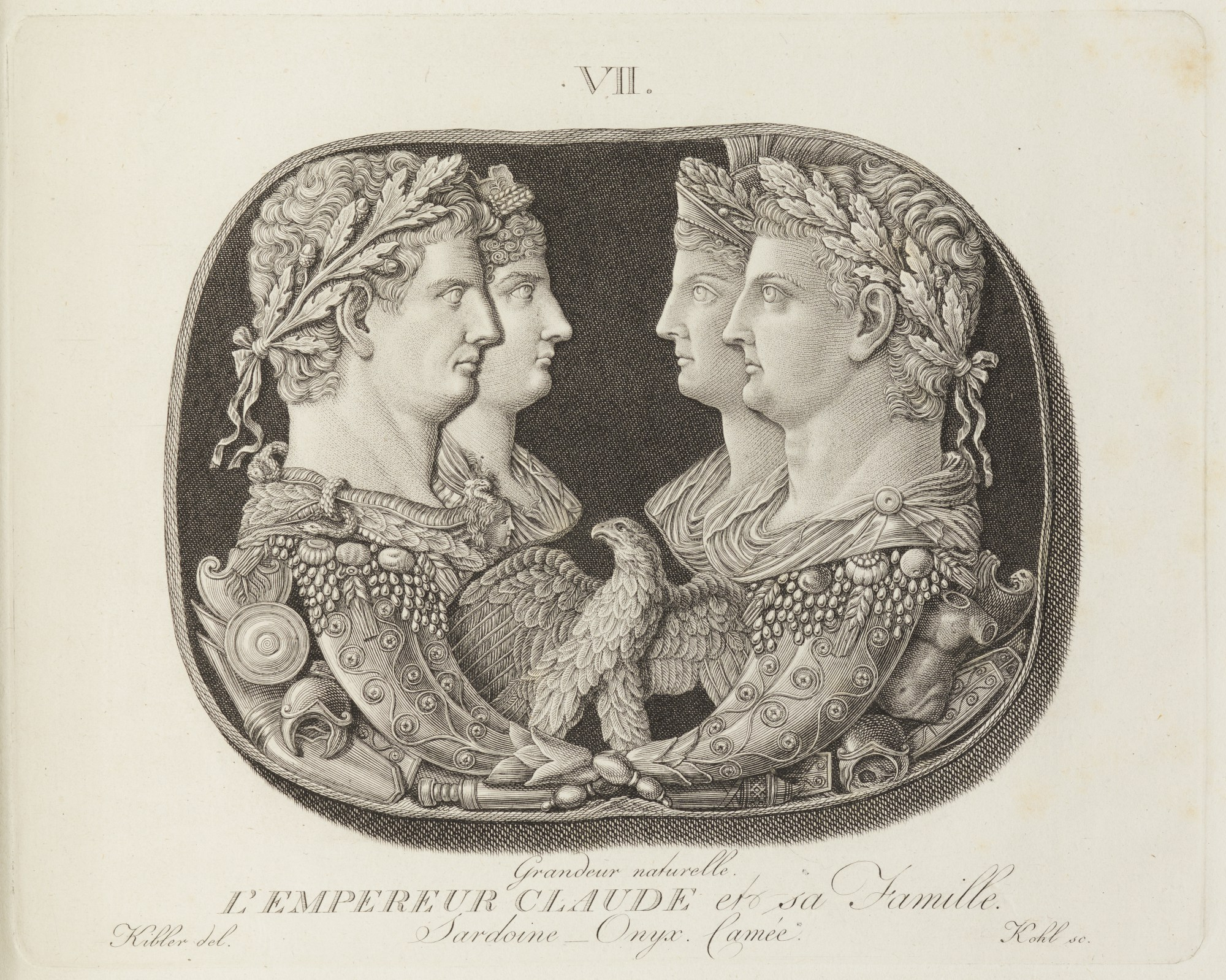 L'Empereur Claude et sa Famille (apres Friedrich Kibler)